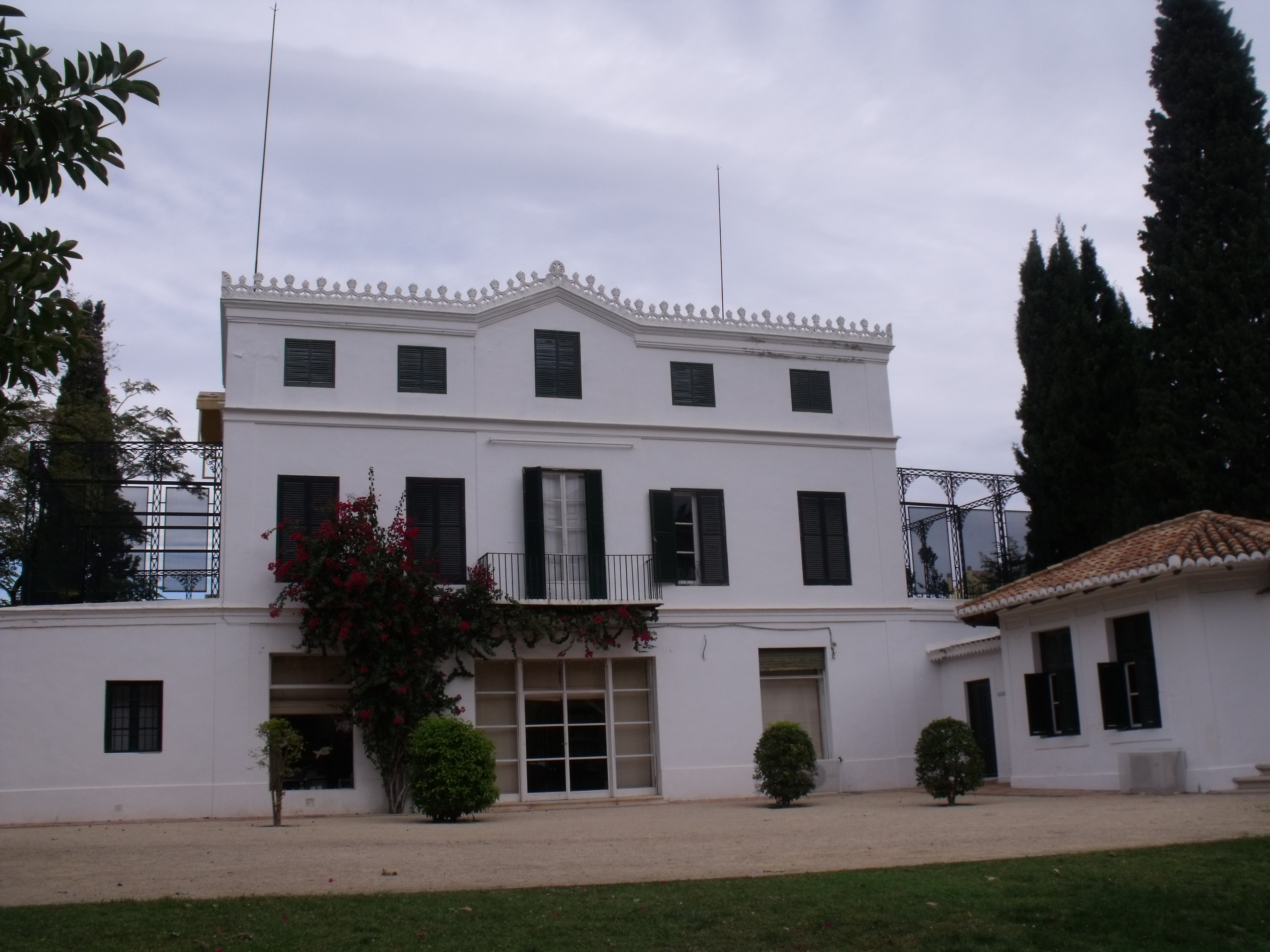 Huerto de Trenor. Torrent, España.